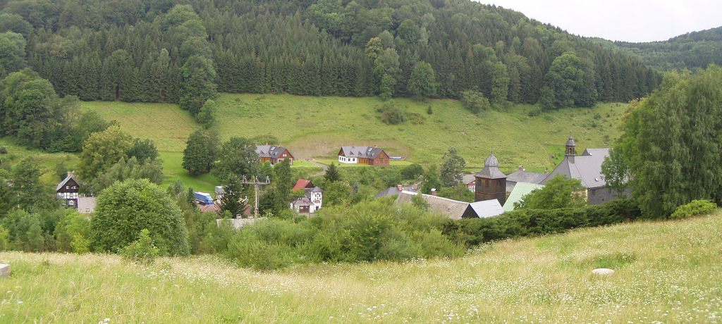 Kryštofovo Údolí (panorama)